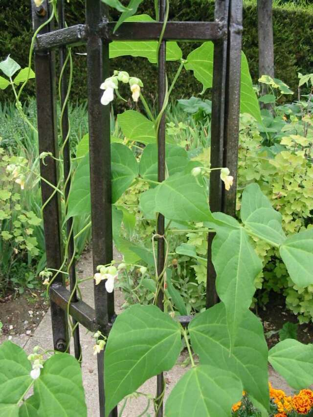 Haricot grimpant; Photo JH Mora, août 2004; Épône; Licence GFDL